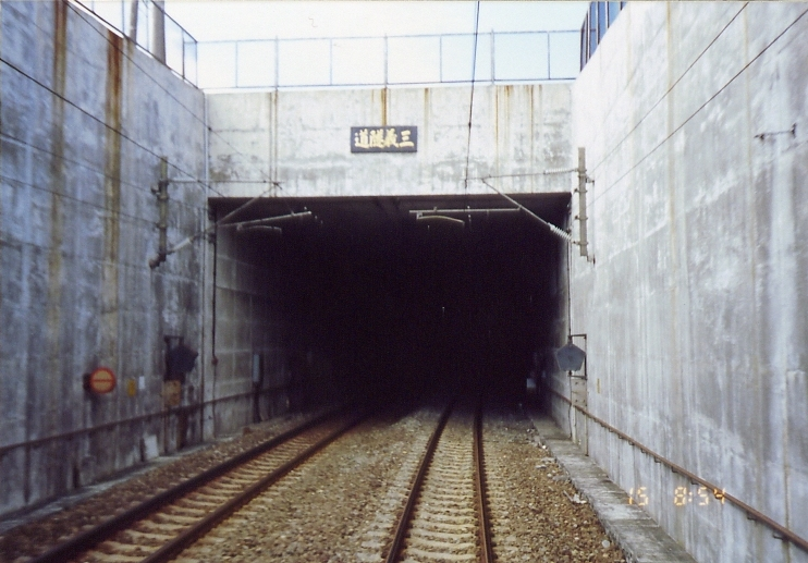 Sanyi Tunnel,三義隧道